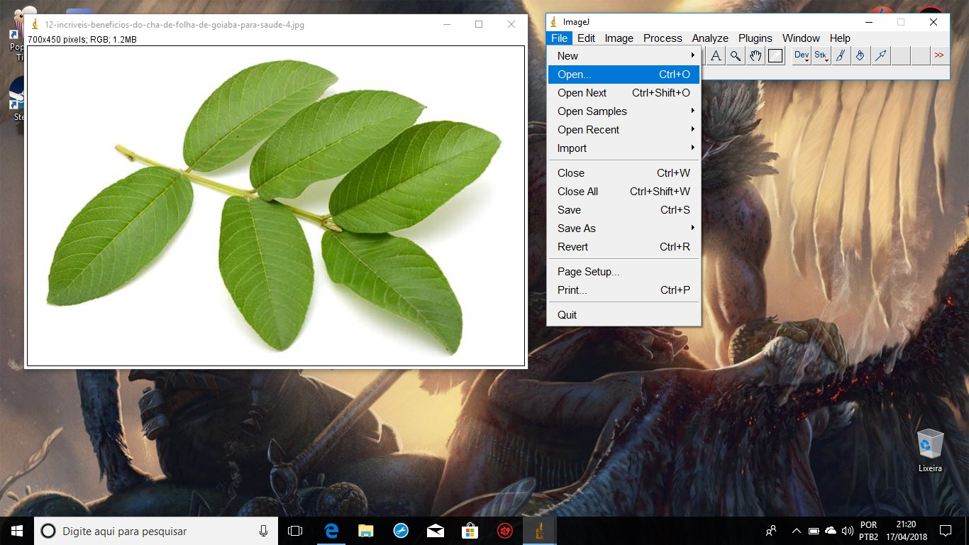 Passo 1.